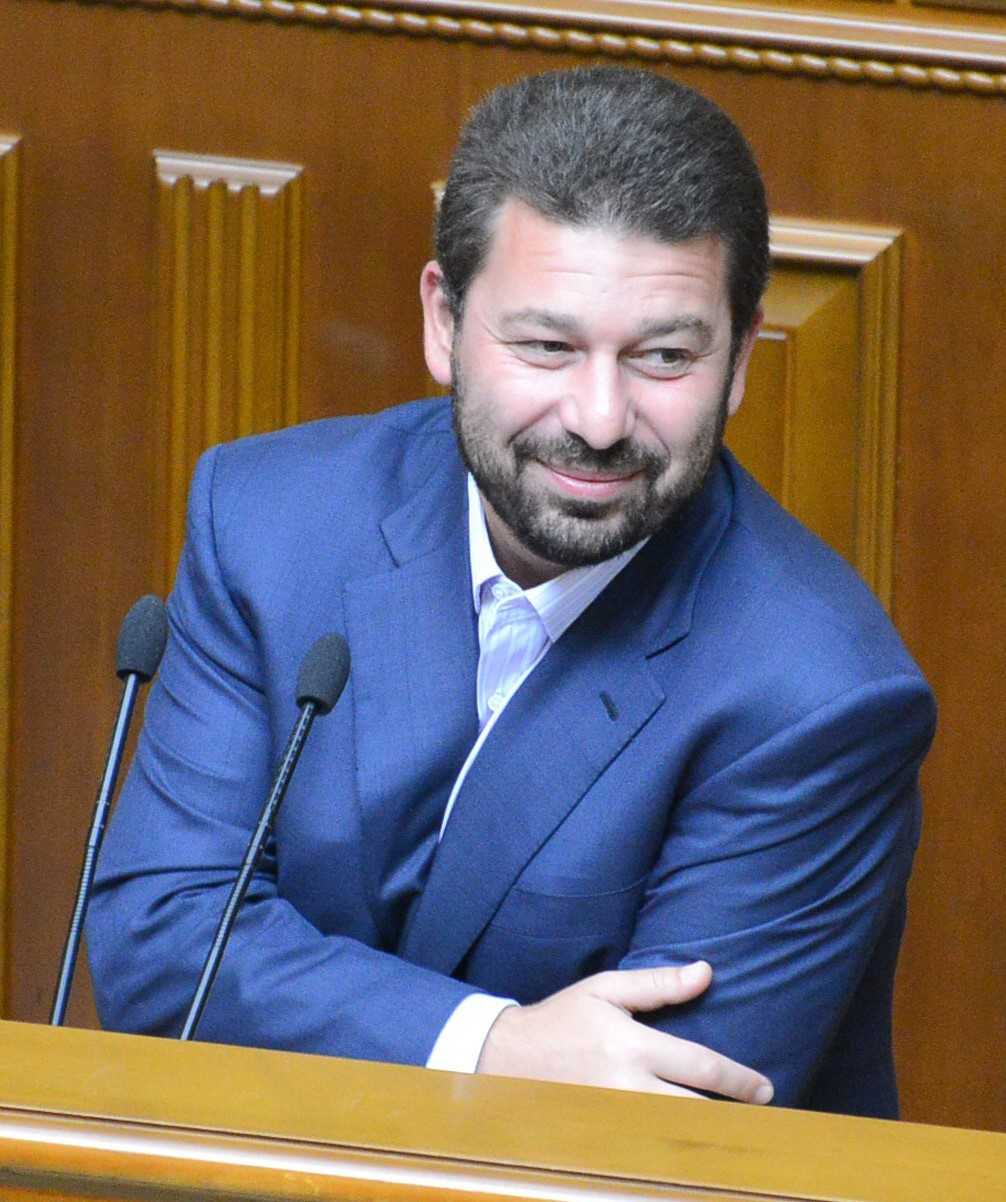 ВЕРХОВНА РАДА УКРАЇНИ 2013 , фото Вадим Чуприна ©